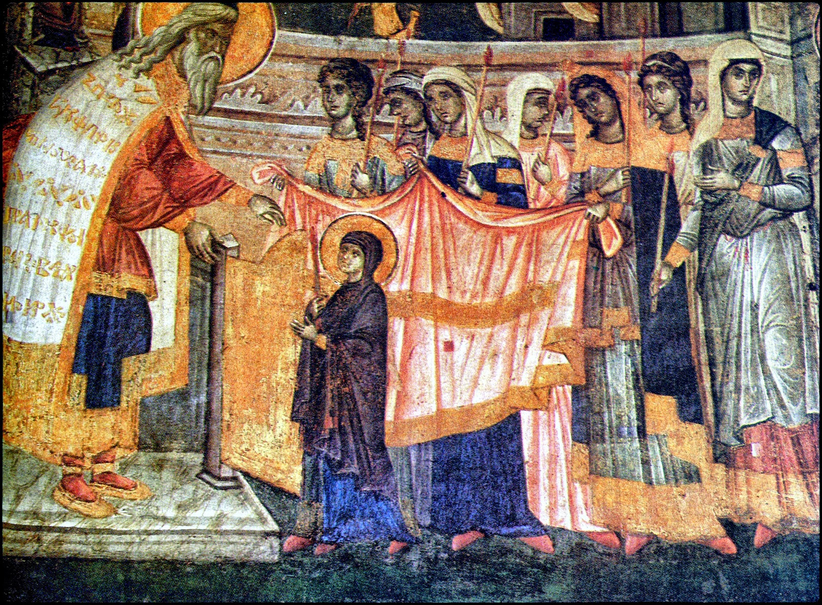 Μονή Χιλανδαρίου. Τα Εισόδια της Θεοτόκου.Περί το 1319